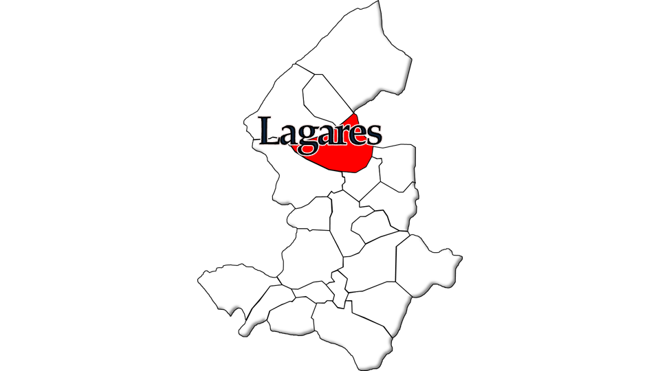 População